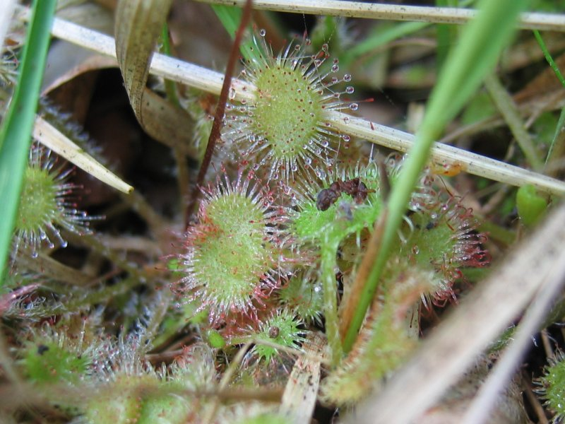 Rundblättriger Sonnentau (Drosera rotundifolia)